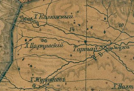 Фрагмент «Карты Ставропольской губернии составленной при ставропольской губернской чертёжной по новым сведениям по указаниям и под непосредственным наблюдением ставропольского губернатора, генерал-майора Н. Е. Никифораки в 1896 году»